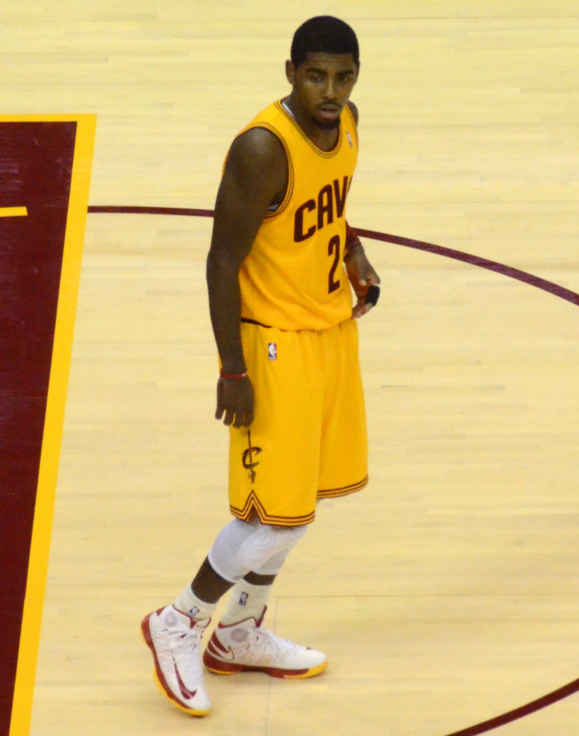 Kyrie Irving